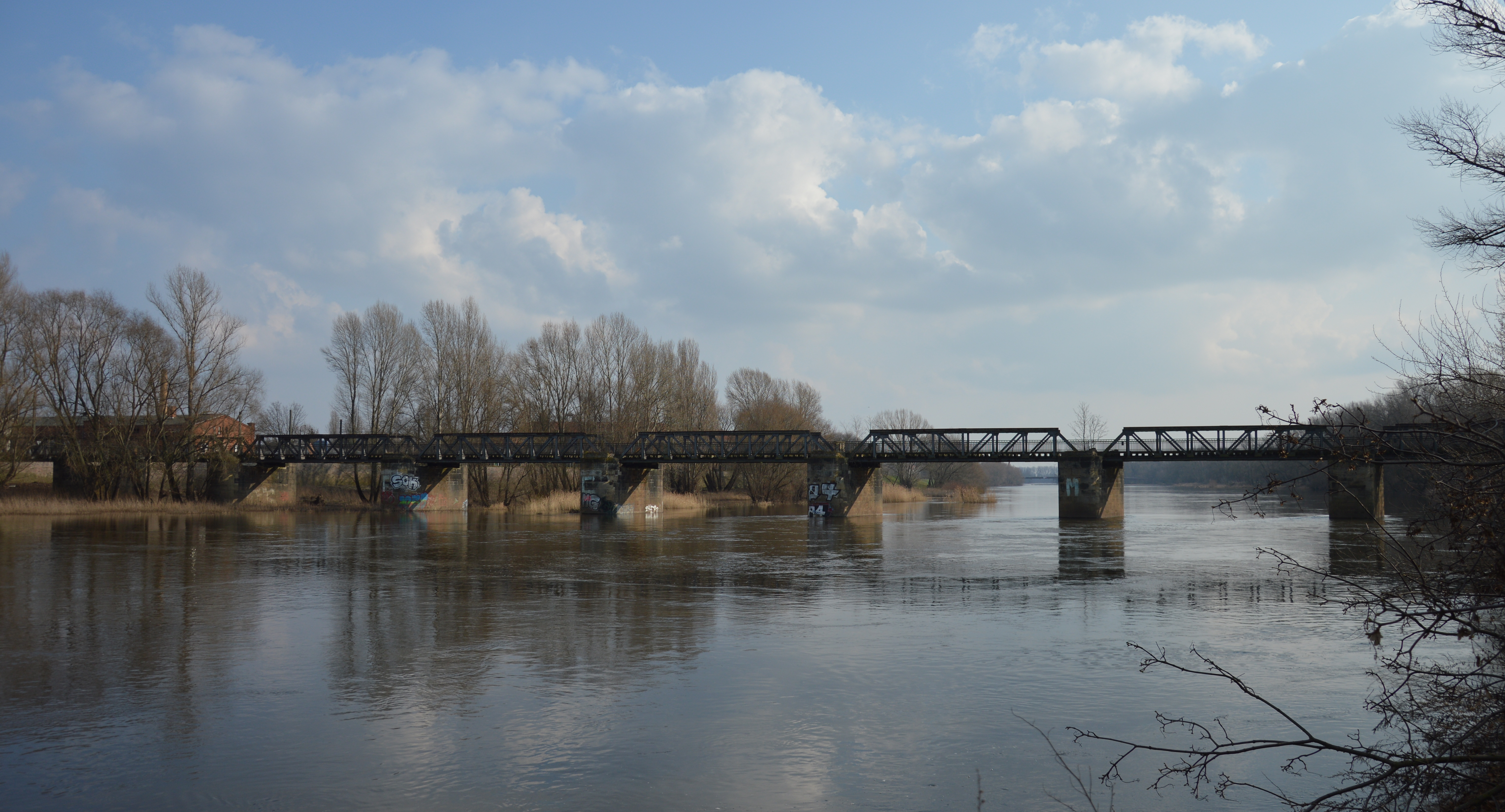 Kanonenbahnbrücke